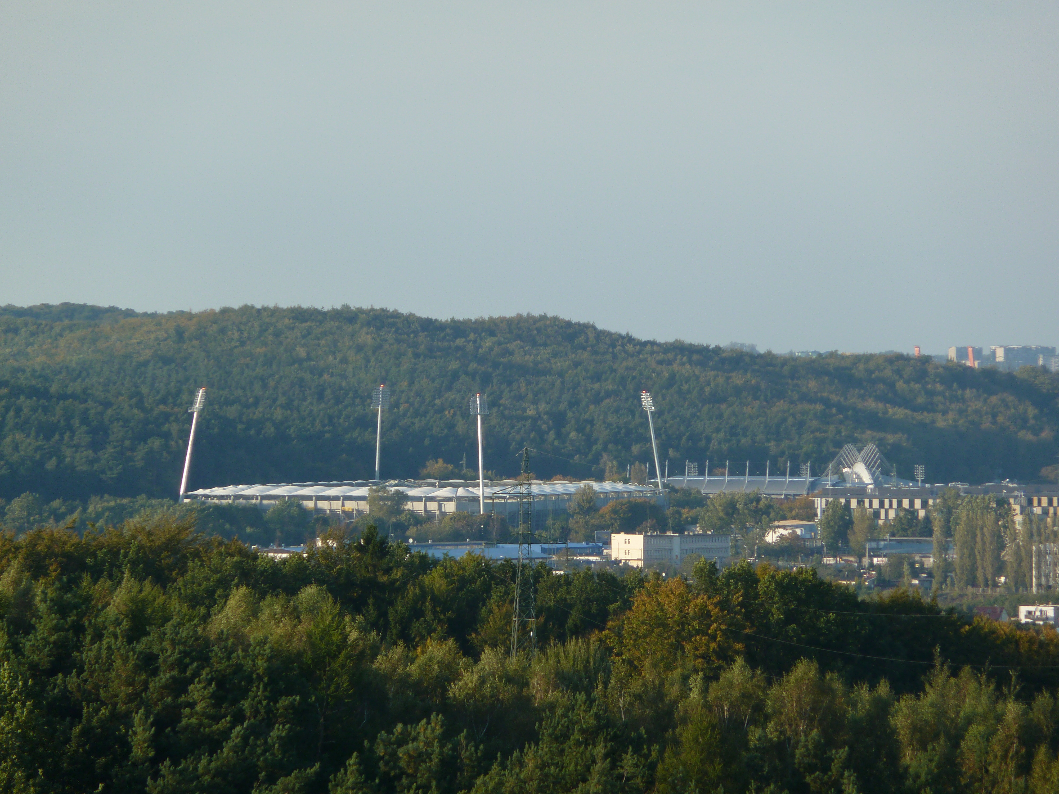 Nowy stadion piłkarski w Gdyni widoczny z Wieży widokowej w Kolibkach